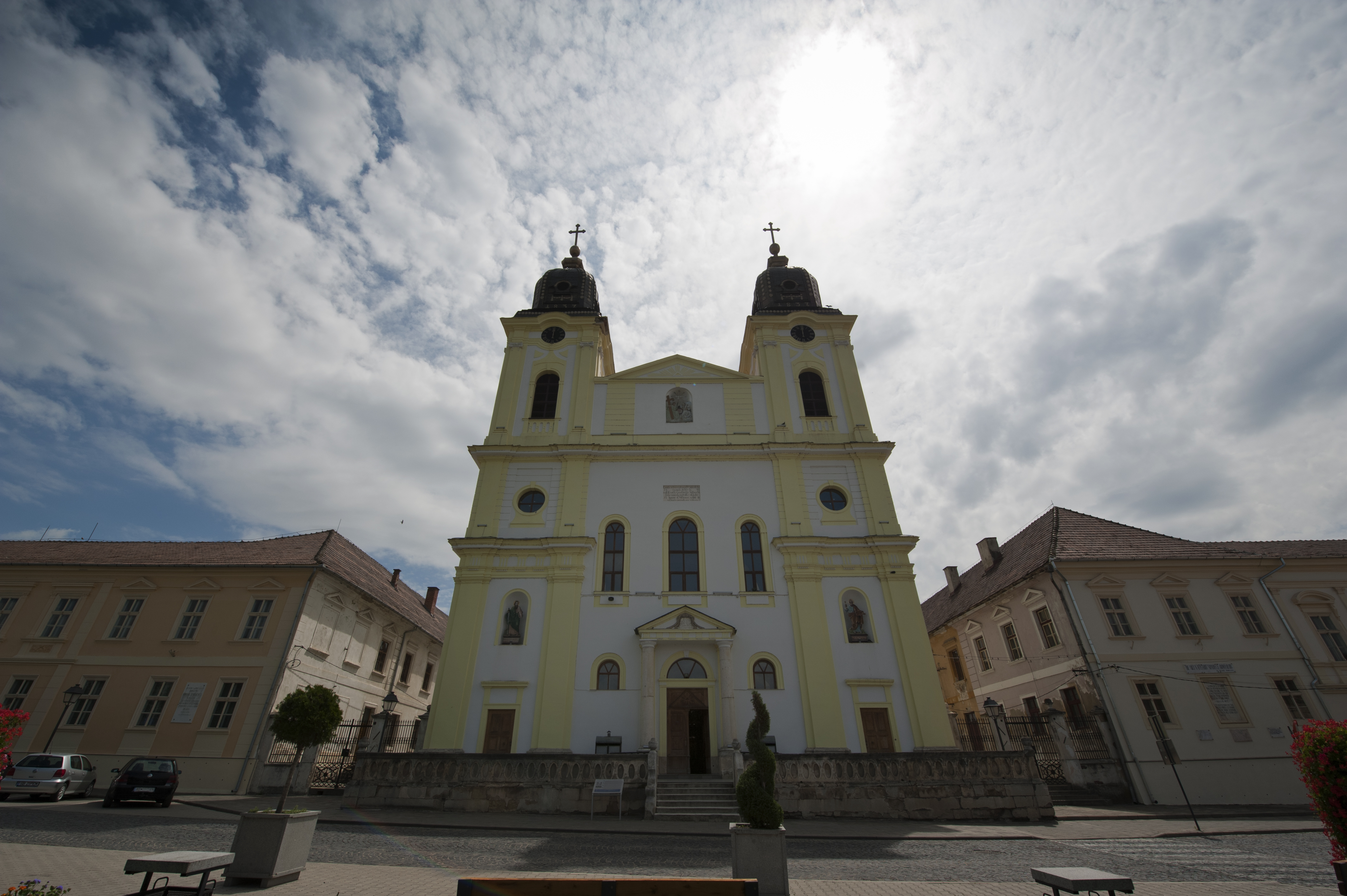 Catedrala greco-catolică „Sf. Treime”